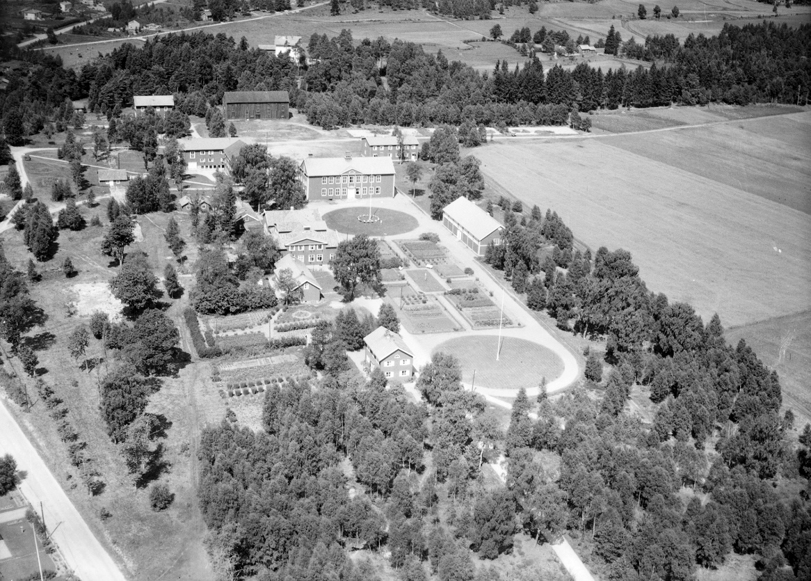 Fristad Älvsborgs Läns Folkhögskola och Lantmannaskola i Fristad.